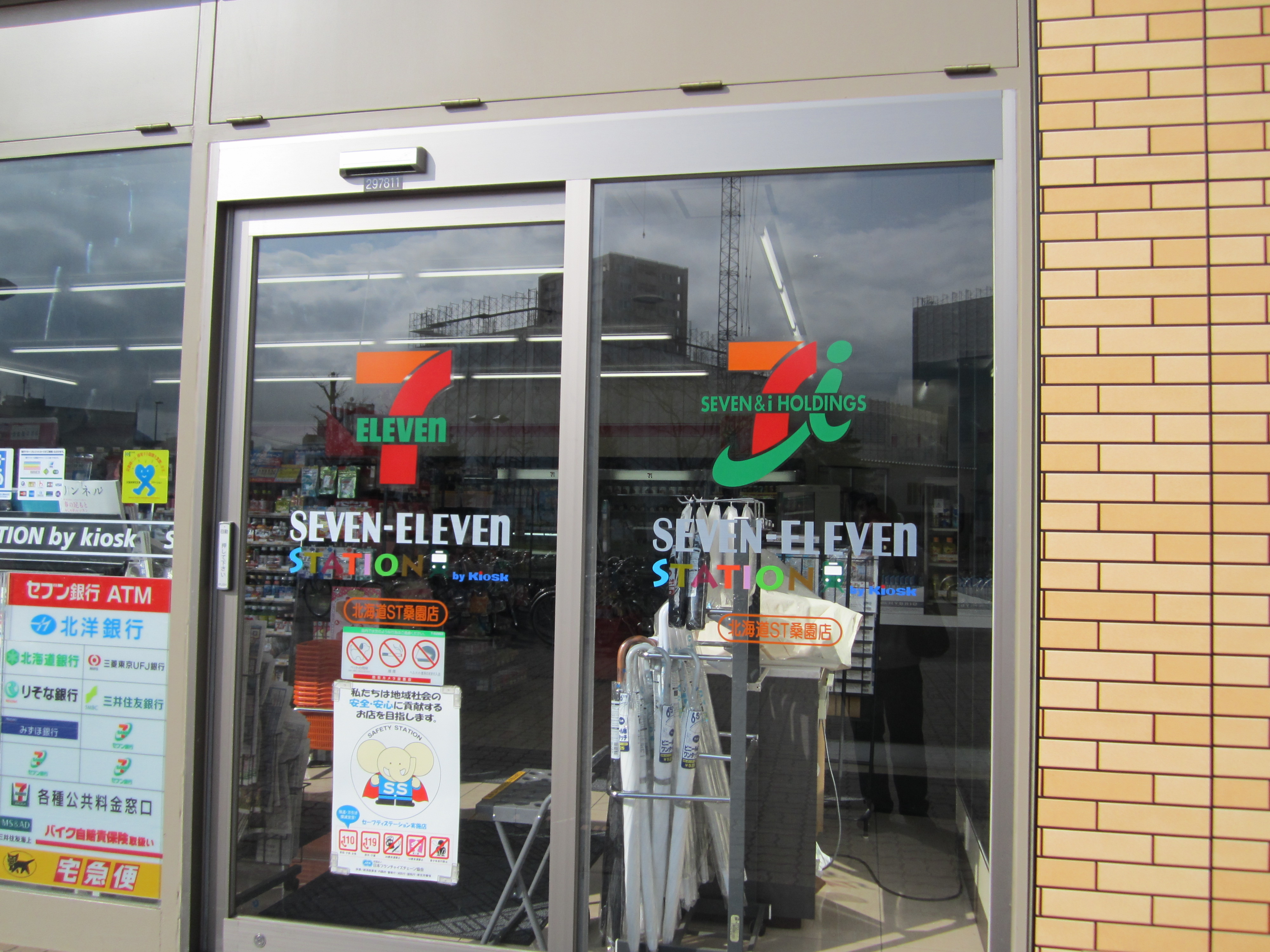 桑園駅構内にあるセブンイレブン by KIOSK（JR北海道）